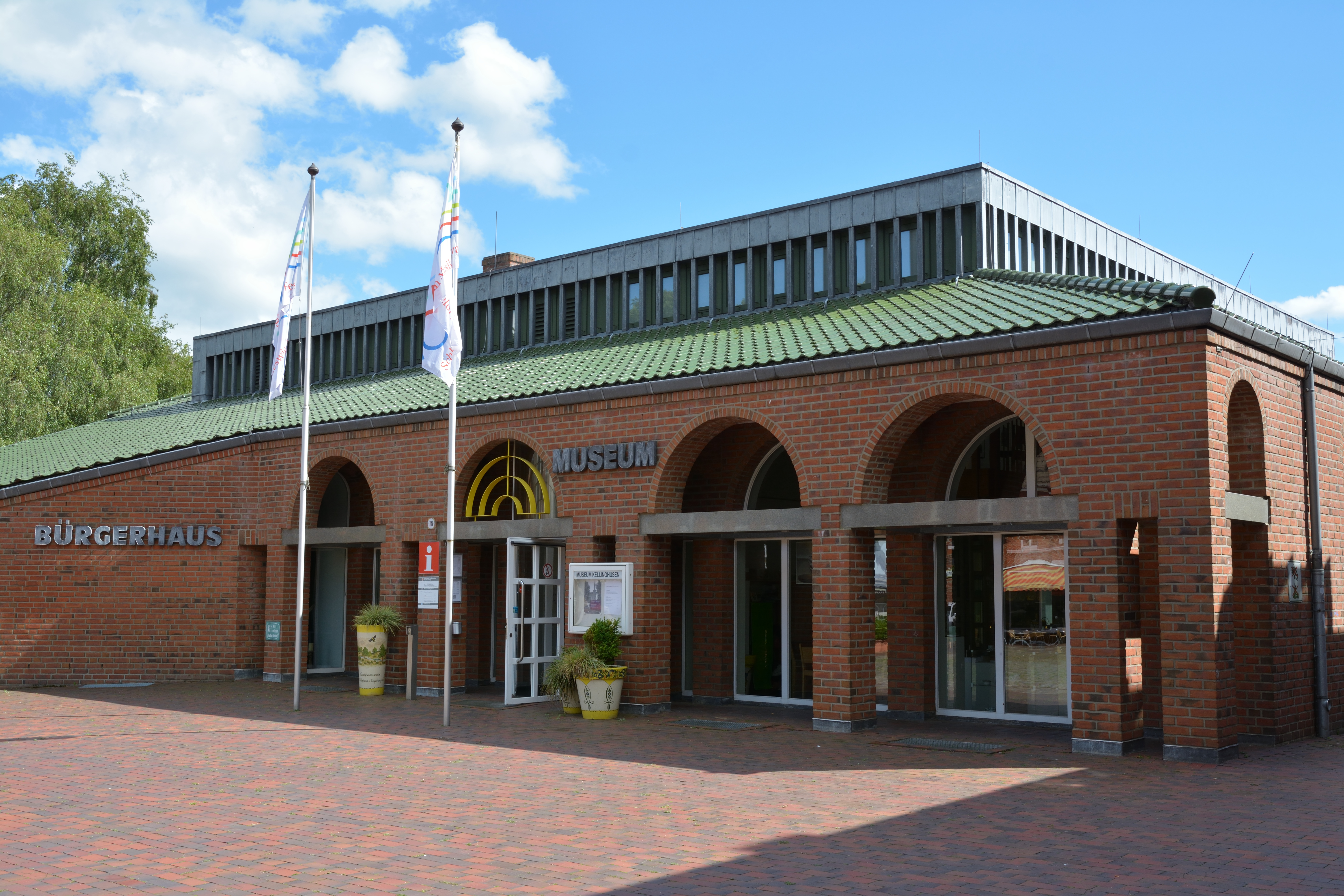 Das Museum in Kellinghusen im Bürgerhaus